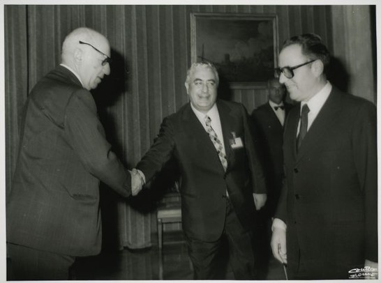 Paolo Baffi e Carlo Azeglio Ciampi incontrano un funzionario della Camera